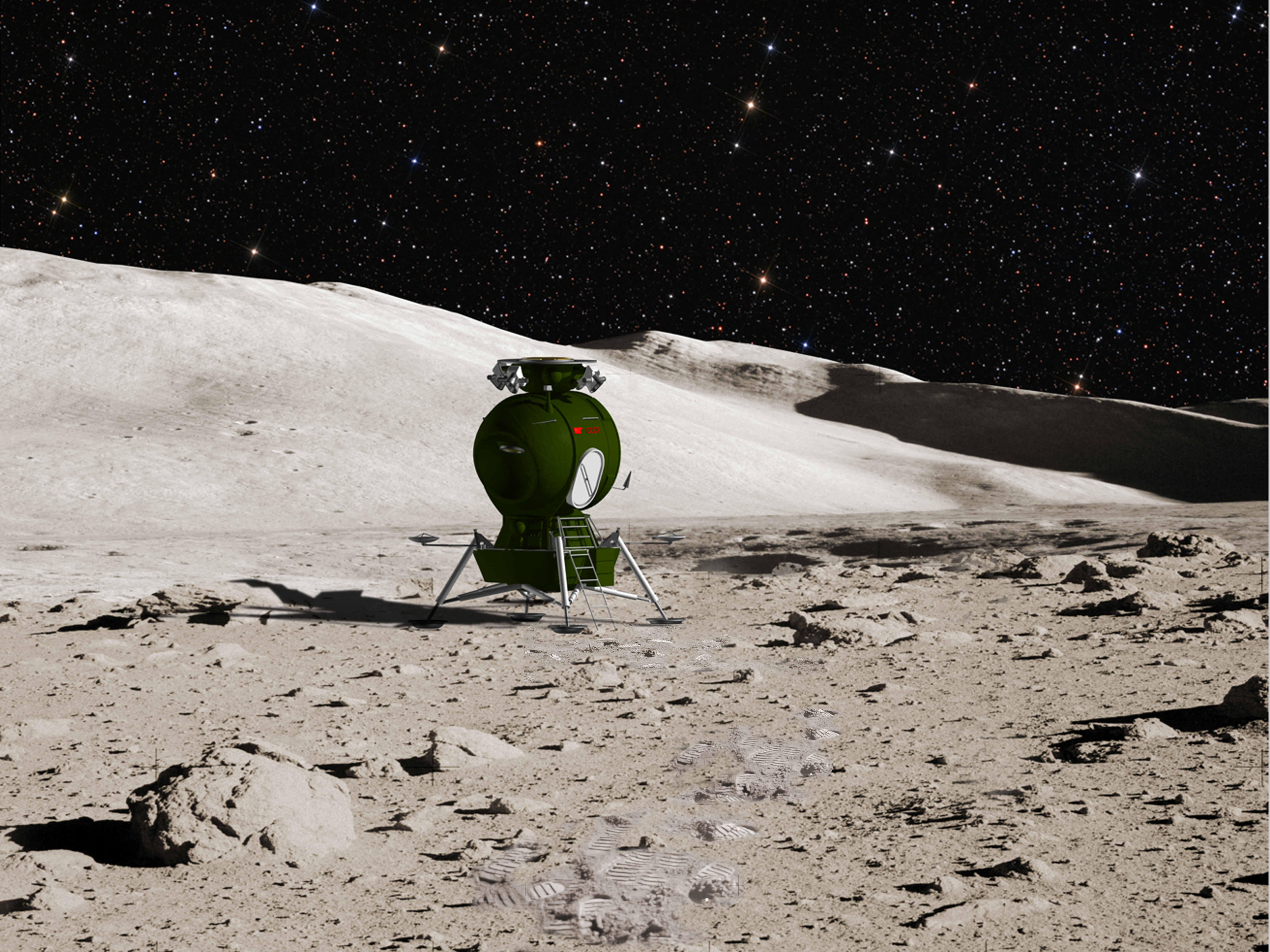 sowjetischer Mondländer LK auf dem Mond